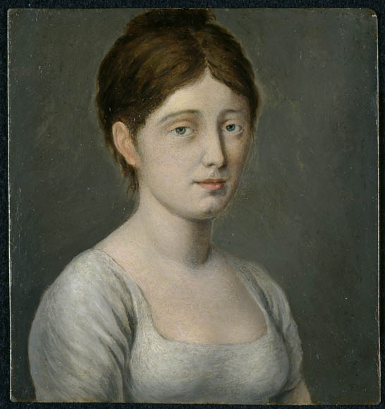 Portrait de Amélie Panet-Berczy (1789-1862)